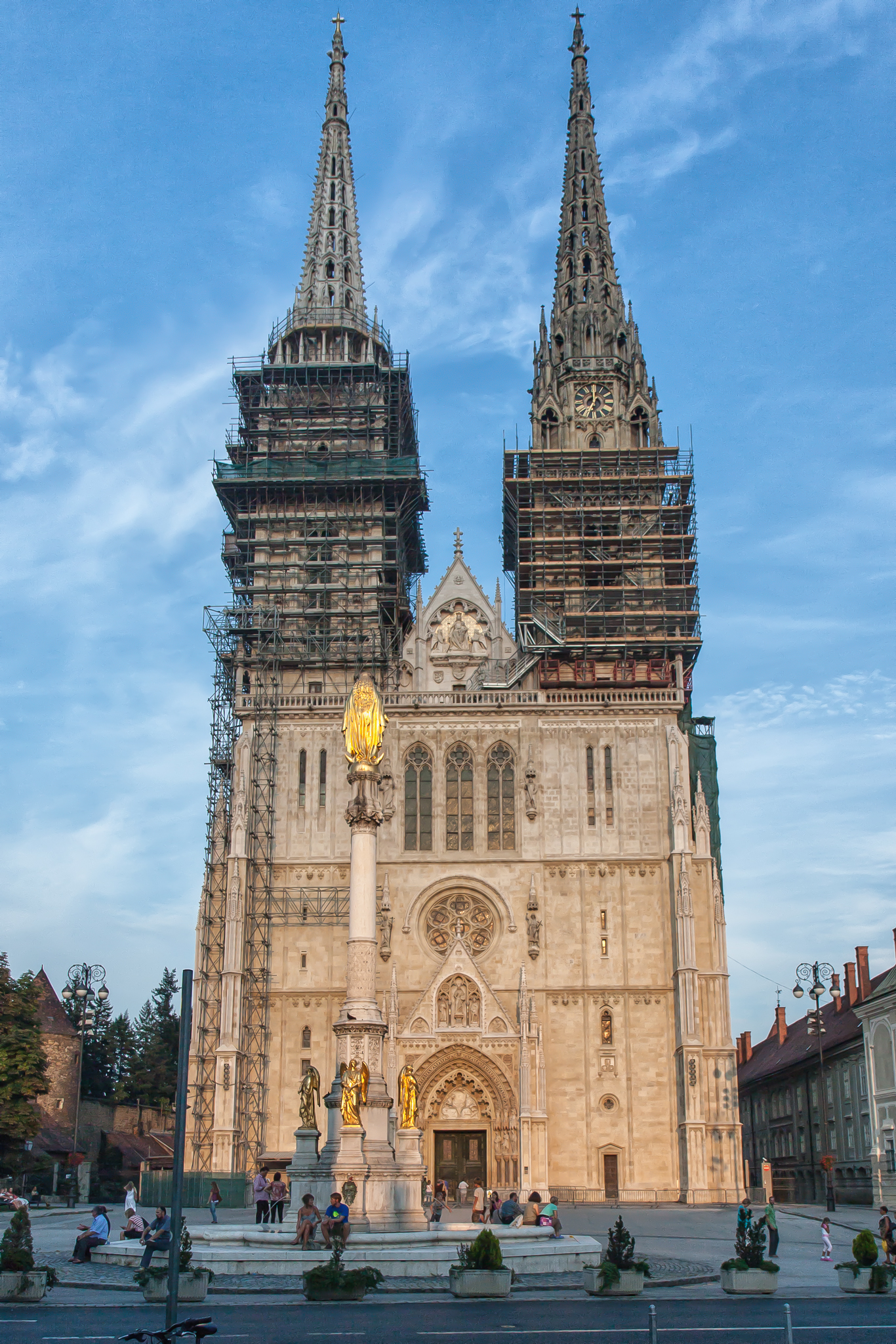 Kathedrale - Zagreb - 2010